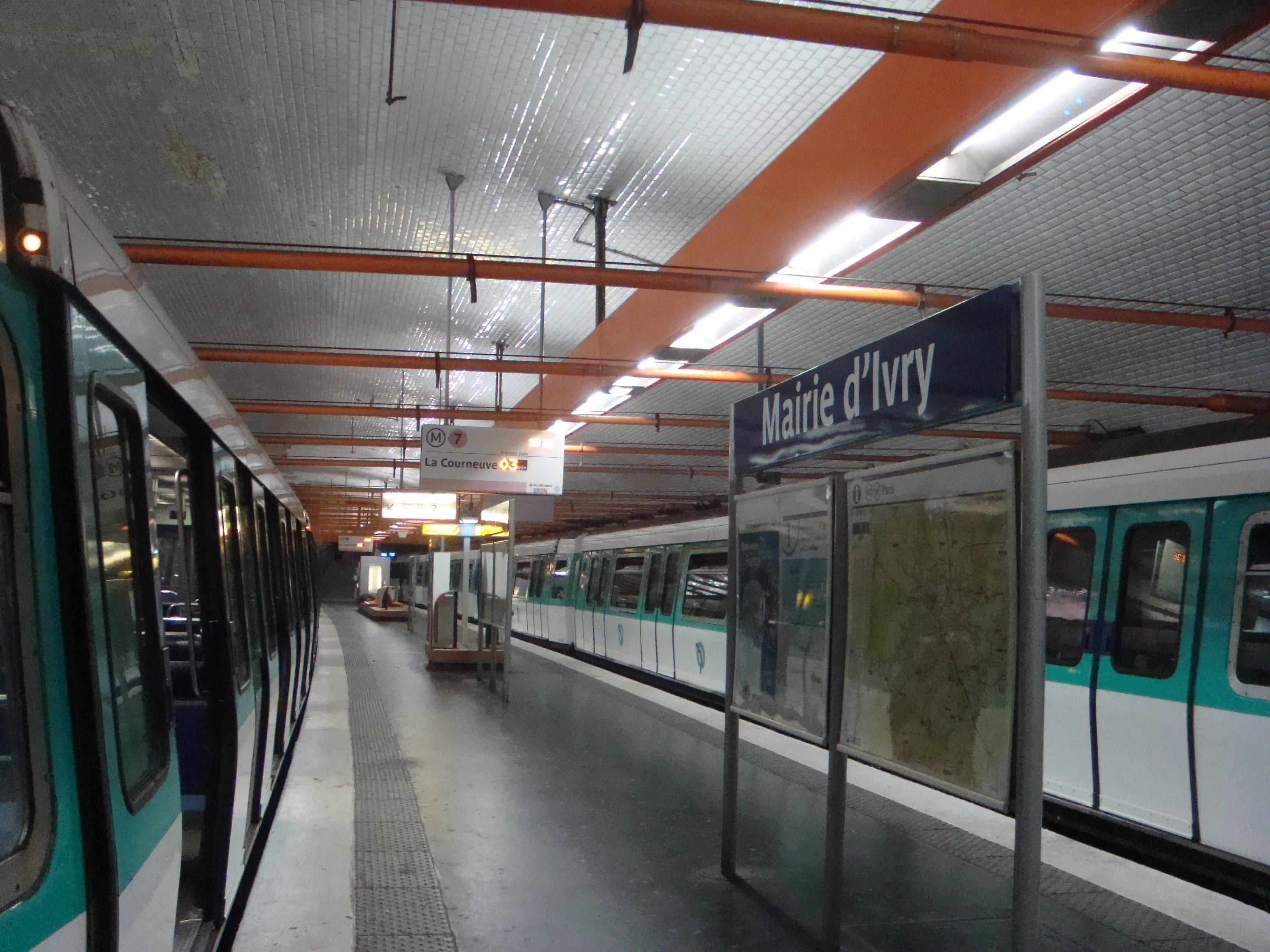 Quais de la station Mairie d'Ivry sur la ligne 7 du métro parisien.